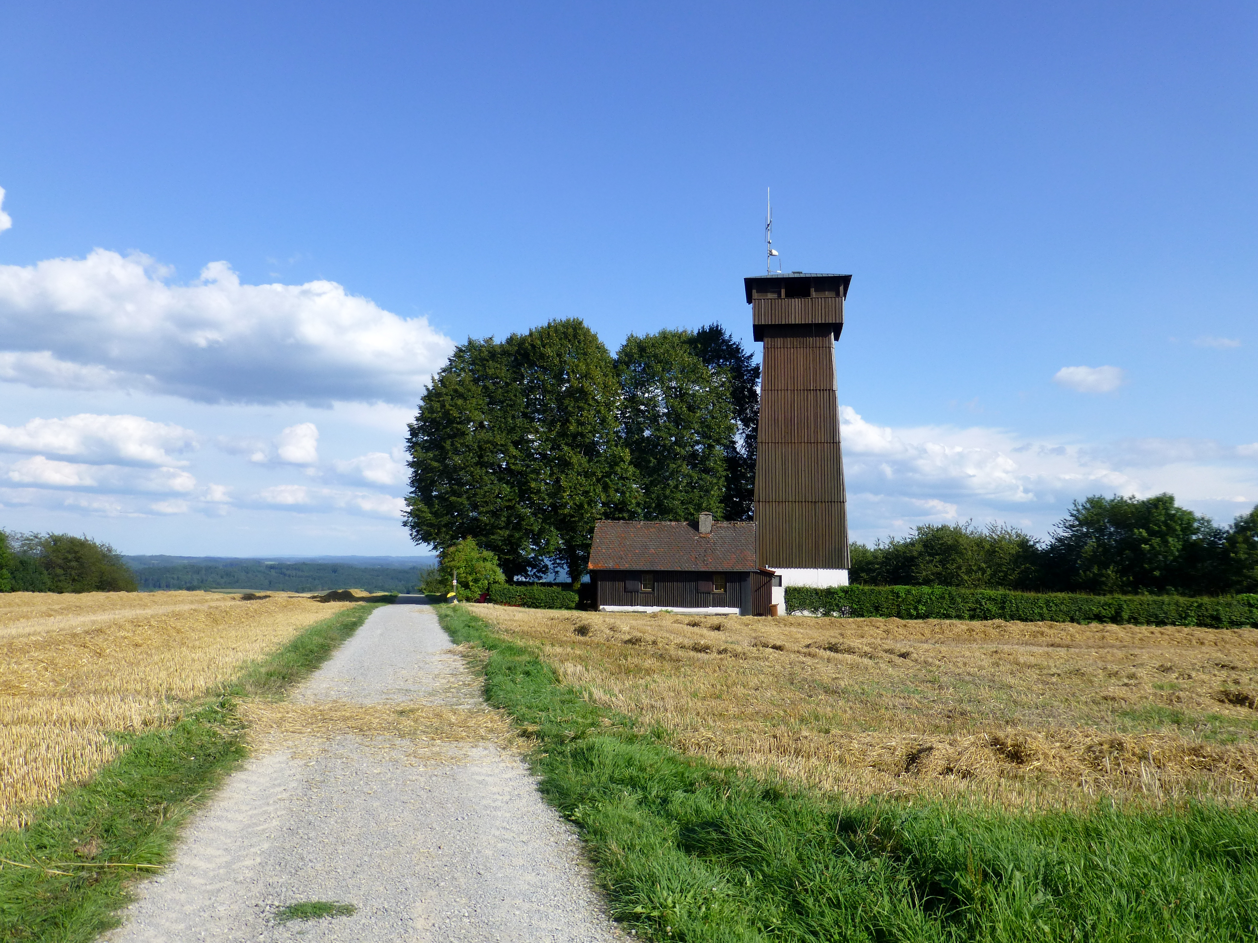 Juxkopfturm mit Hütte des Schwäbischen Albvereins; Ansicht von Westnordwesten